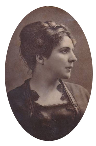 Portrait of French actress Miss Agar.